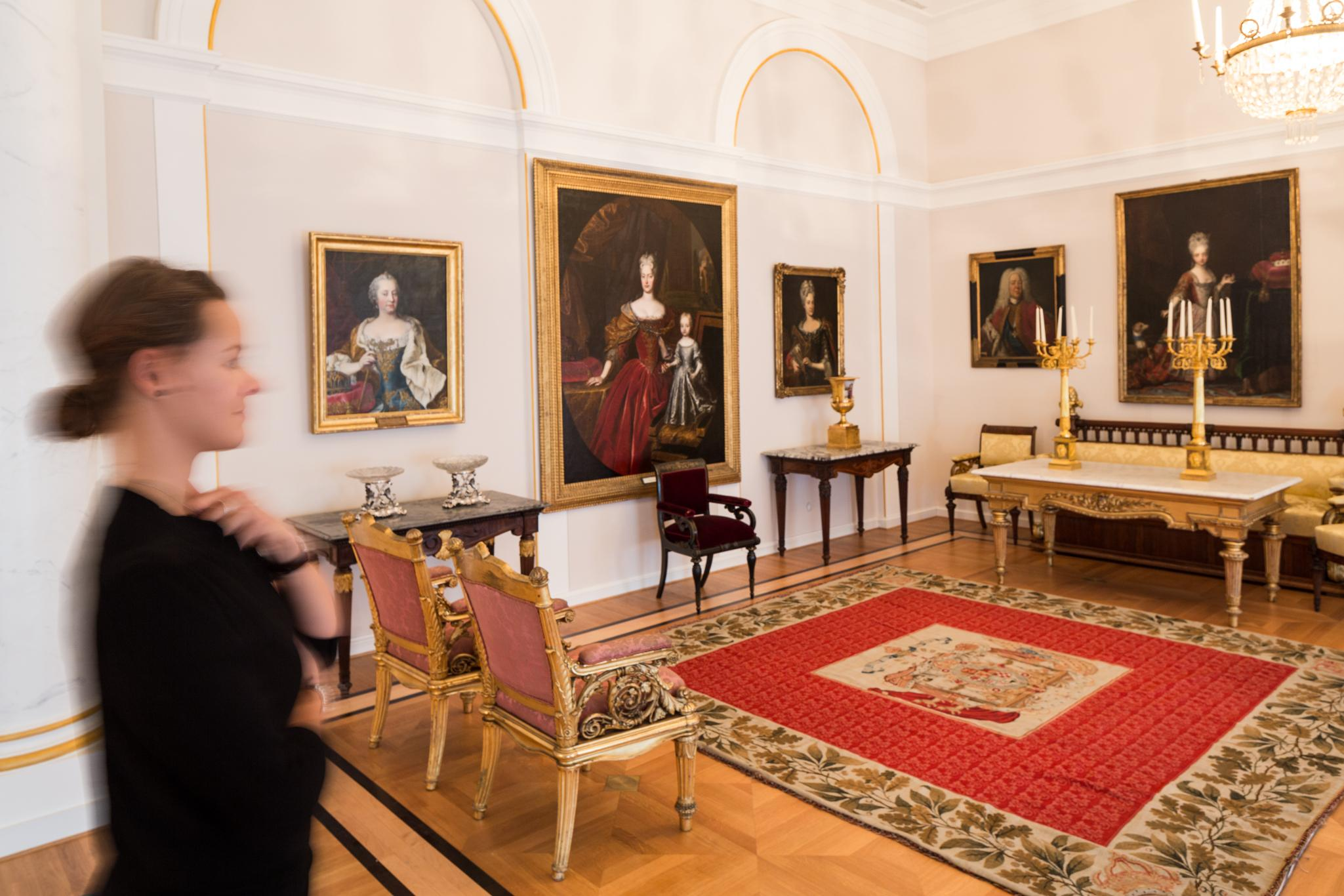 Das Bild zeigt das Audienzzimmer im Schlossmuseum Braunschweig.